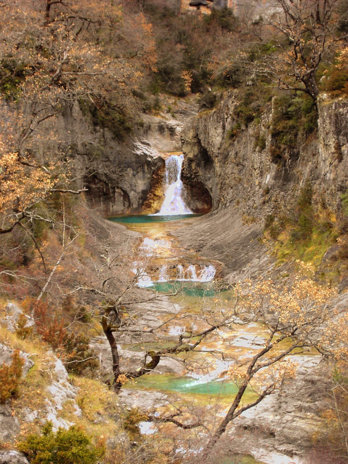 Las cascadas que describe el río Yaga al salir de las Gargantas de Escuaín.Aragonés: As cadretas que describe o río Yaga en salindo d'os Foratars d'Escuaín.